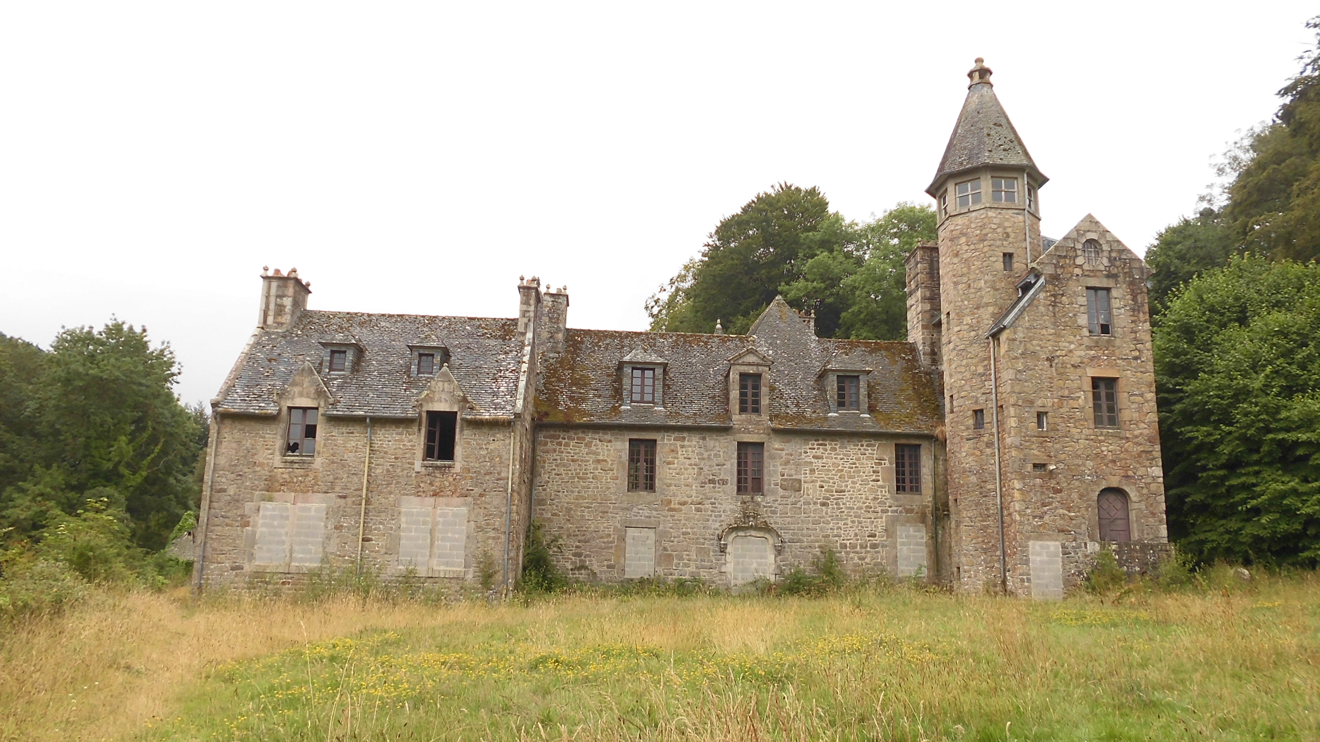 Le célèbre corsaire Charles Cornic a été un des premiers occupants du manoir de Suscinio.